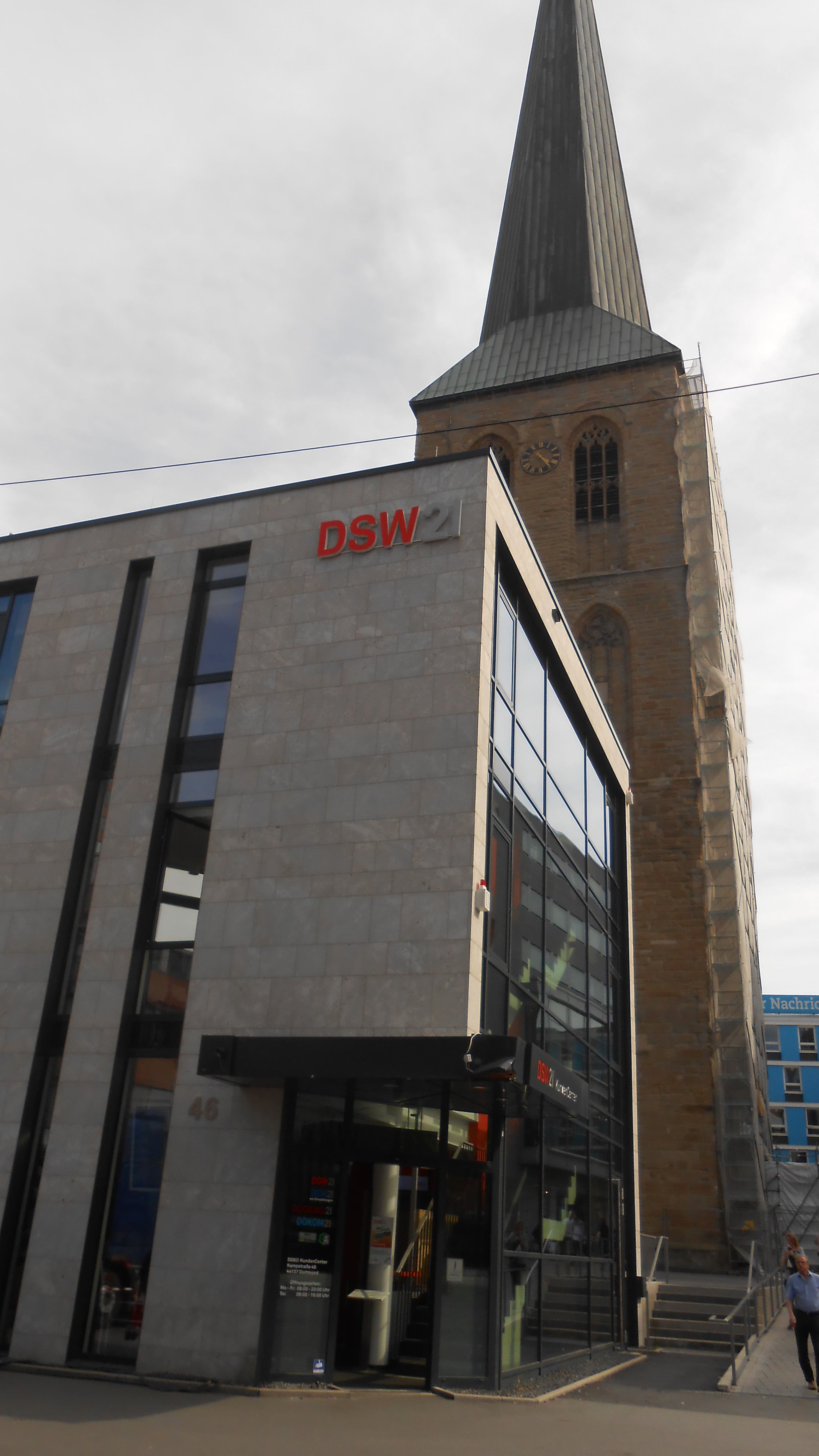 Kundencenter der DSW21 auf der Kampstraße in der Dortmunder Innenstadt (vor der Petrikirche).